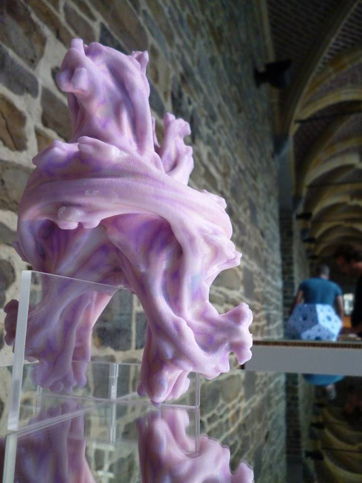 Tricornmarcvanlindt